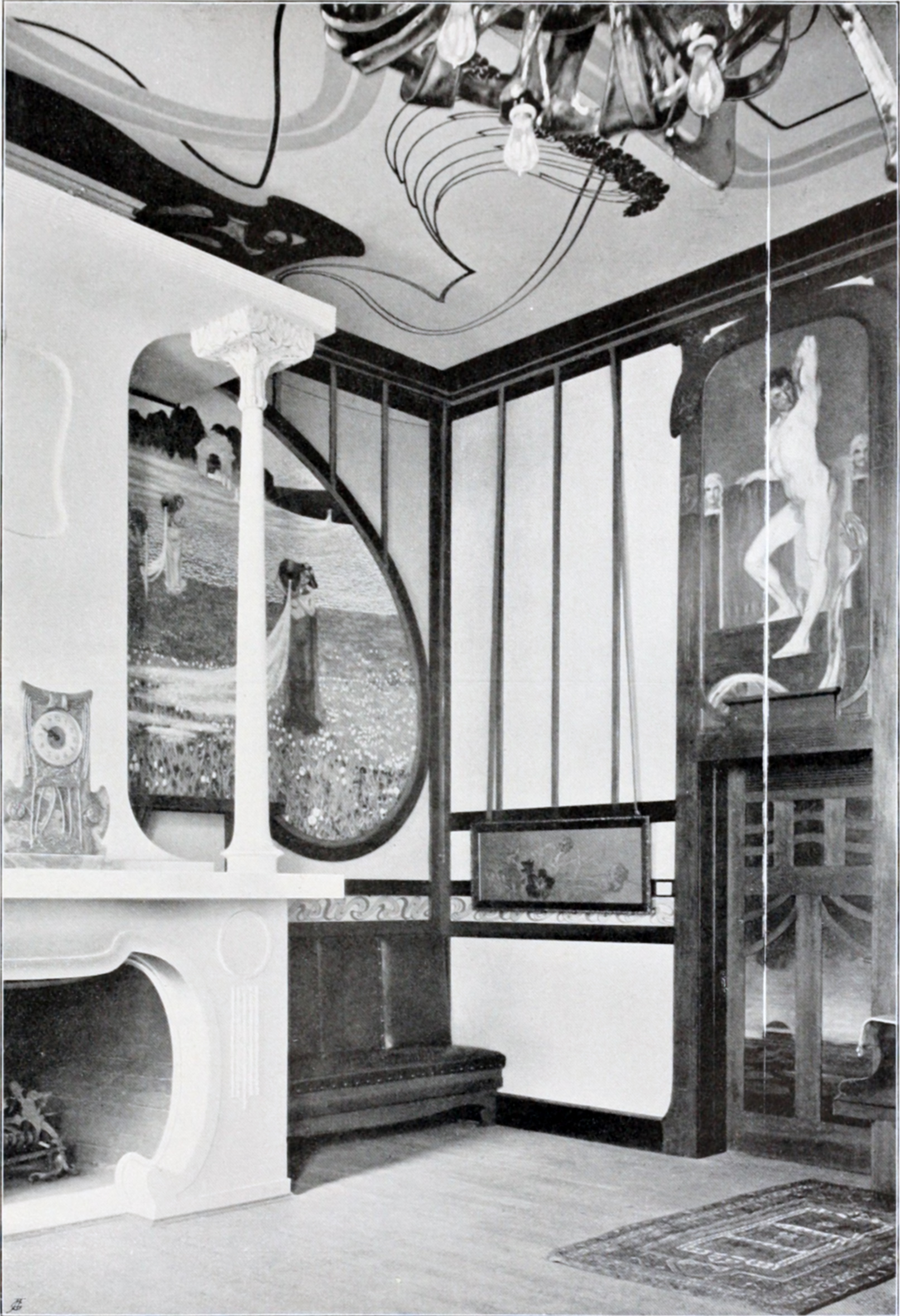 Originalbildunterschrift:„Künstlerhaus in Leipzig Ecke eines Klubzimmers Architekt Fritz Drechsler“